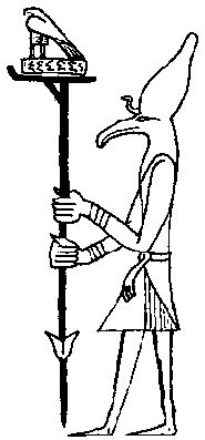 Asch